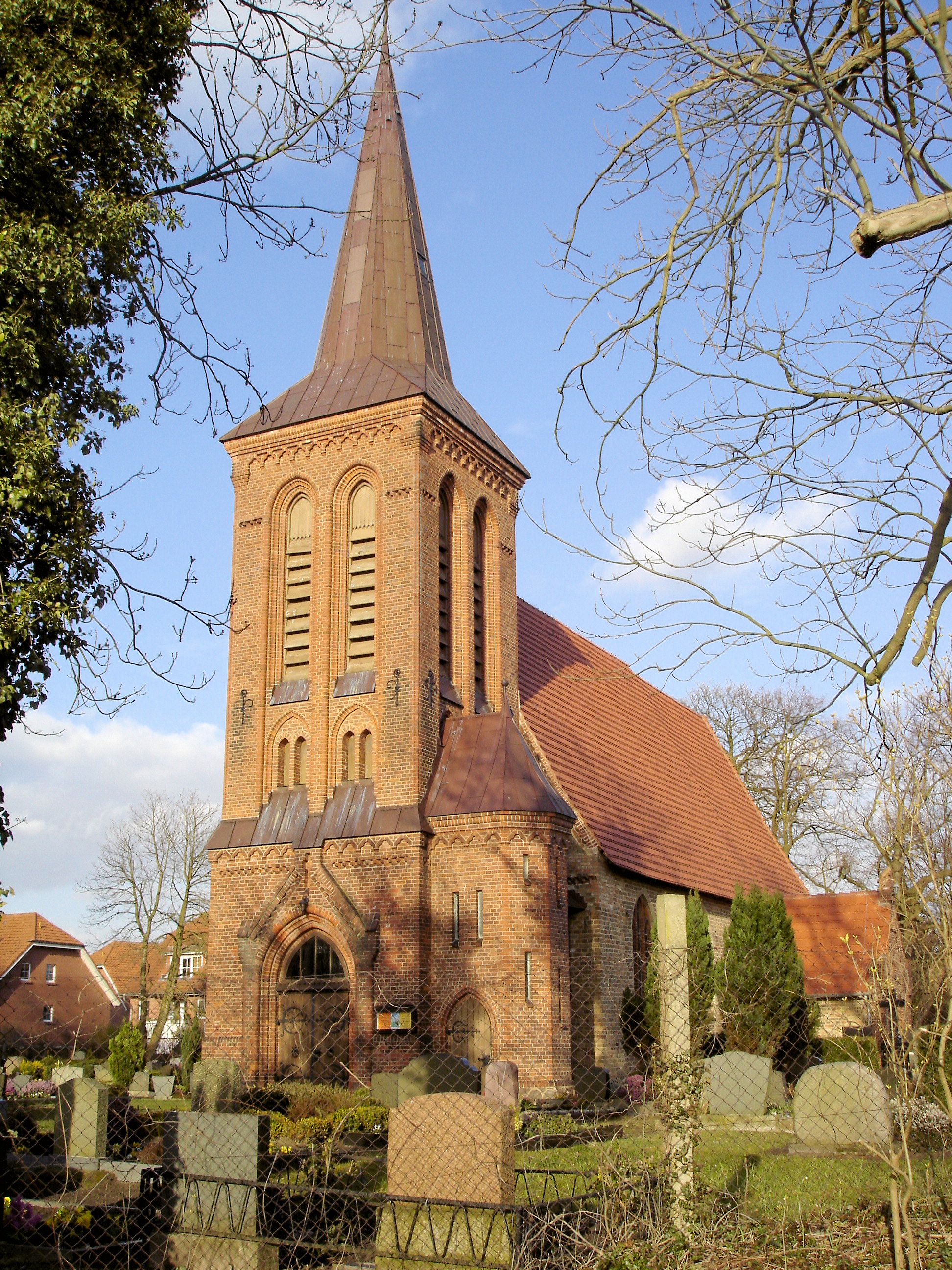 Kirche Rövershagen / Church in Rövershagen